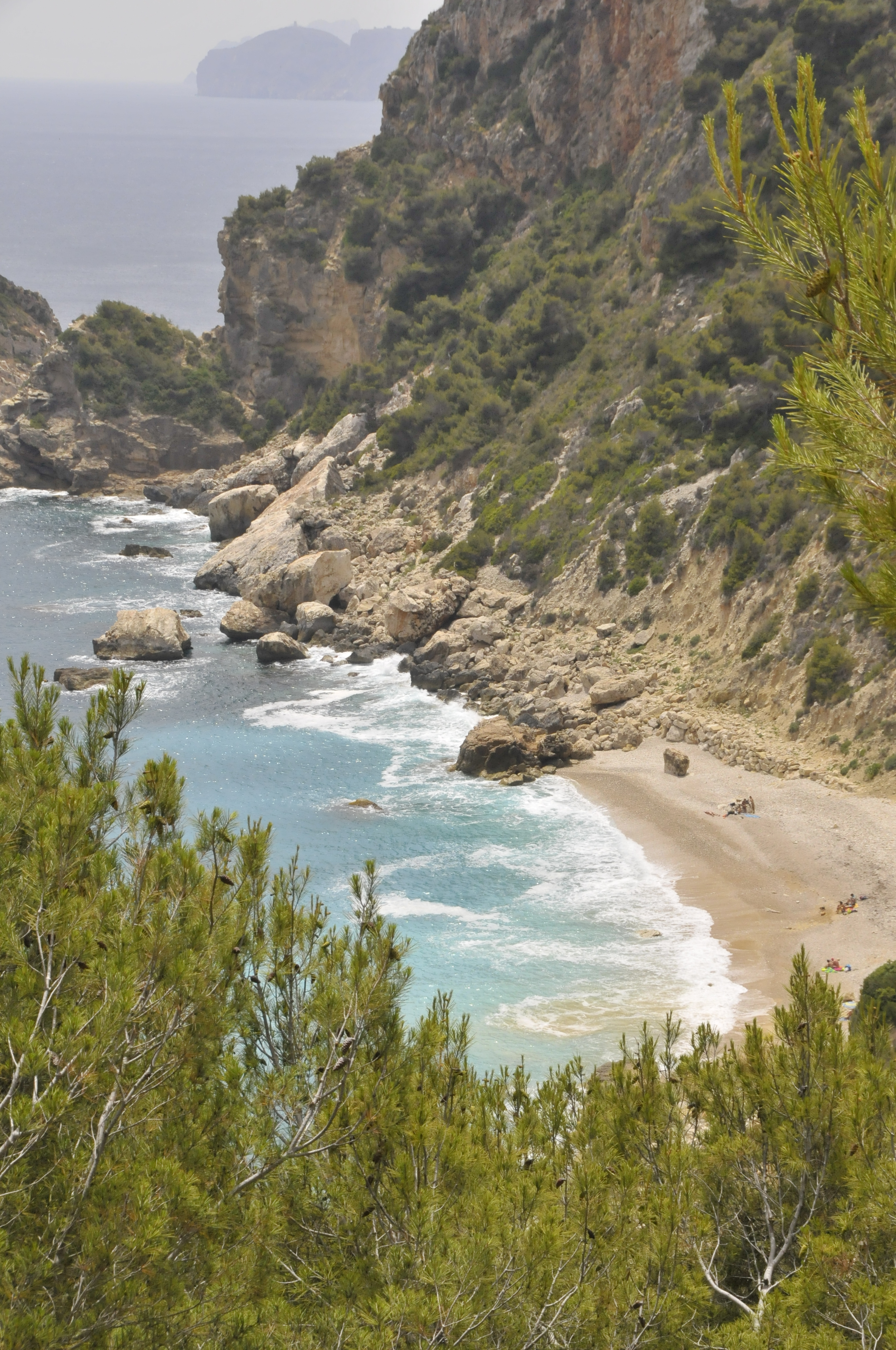 Cala Barraca